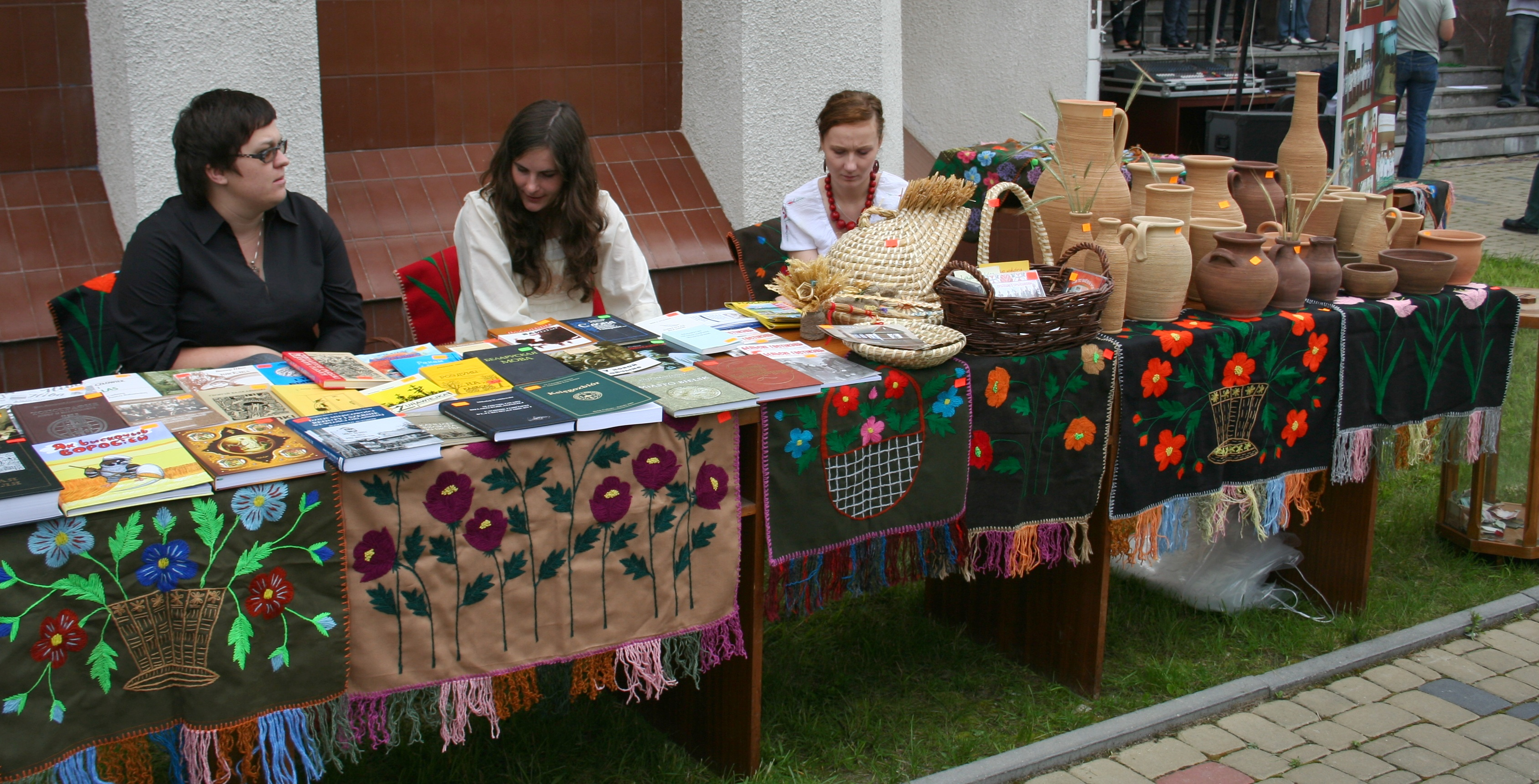 Białoruski festyn etnograficzny "Słonko w słomce", "Kultura na schodach muzeum" w Hajnówce